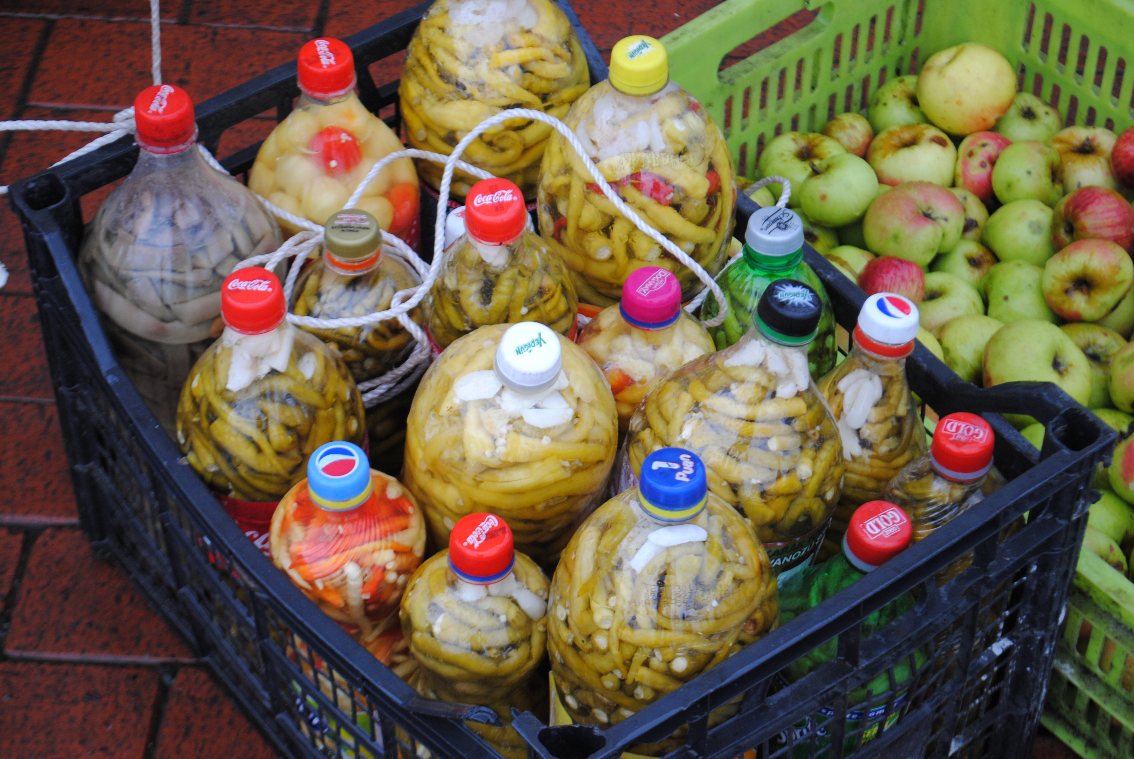 Amasra'dan çeşitli görüntüler